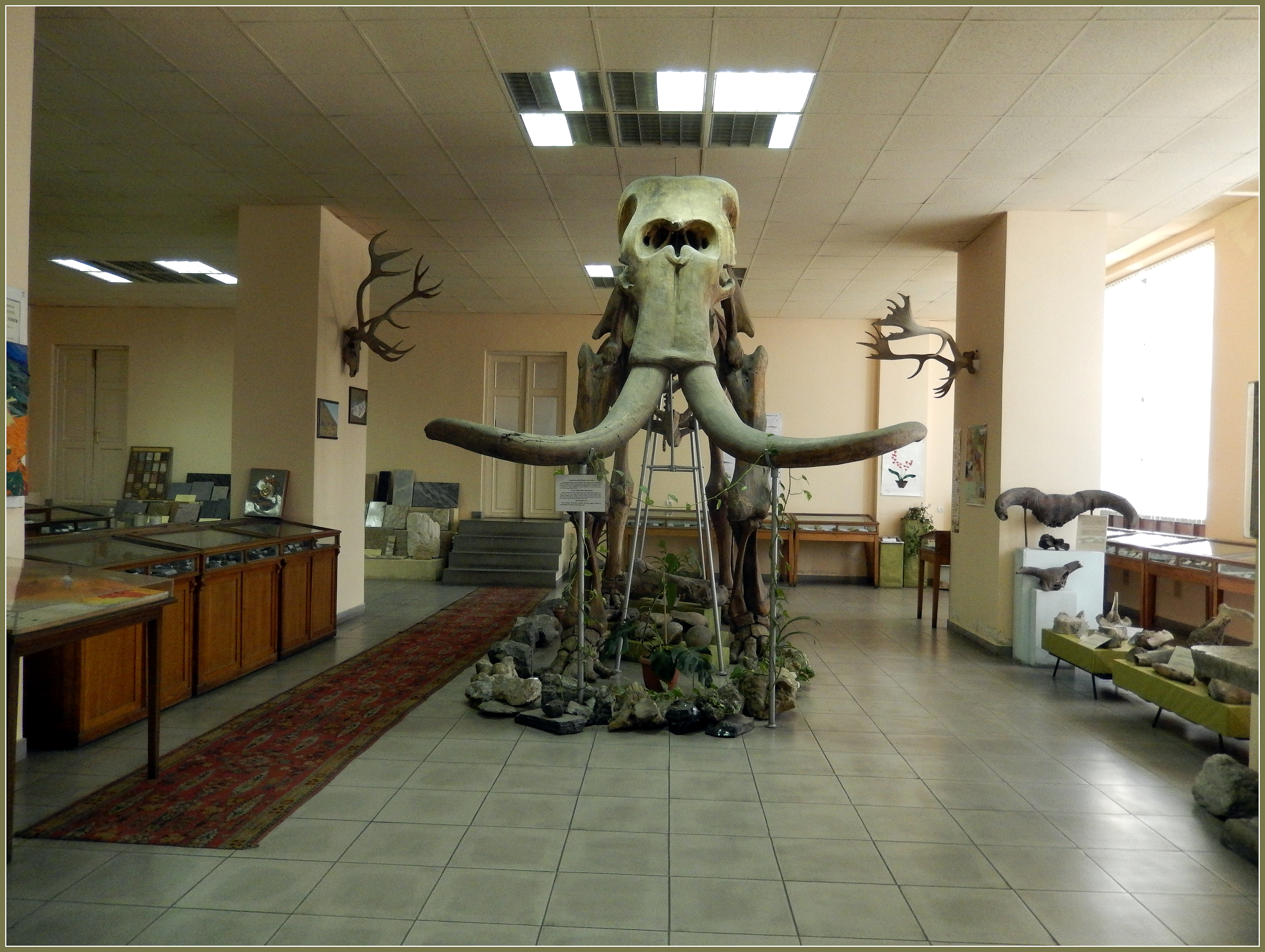 Հովհաննես Կարապետյանի անվան երկրաբանական թանգարան